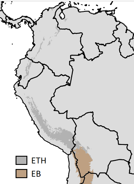 Mapa climático según los parámetros de Köppen y Geiger[1] del clima alpino de páramos y puna de los Andes de la zona intertropical. En gris el clima húmedo y subhúmedo ETH y en marrón el clima seco EB, también clasificado como semiárido BSk y árido BWk en donde el mes más cálido tiene una media menor a 10°C..